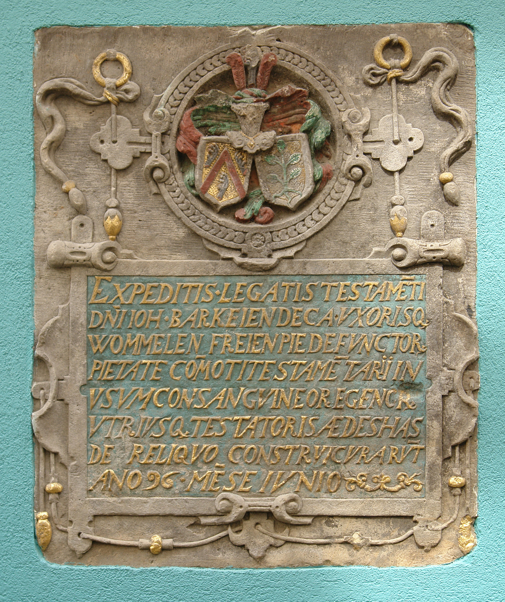 Birgittenkloster im Schnoor, Bremen. Relief an der Straßenfront. Gründungsinschrift des 1596 gestifteten Vorgängerbaus